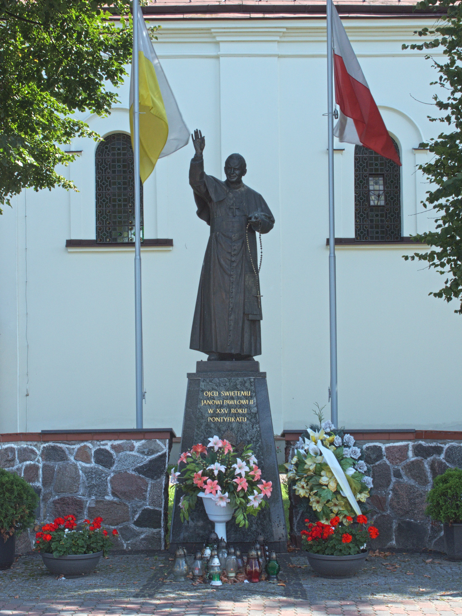 Pomnik Jana Pawła II wbudowany w ogrodzenie kościoła Wniebowzięcia NMP w Brańsku.